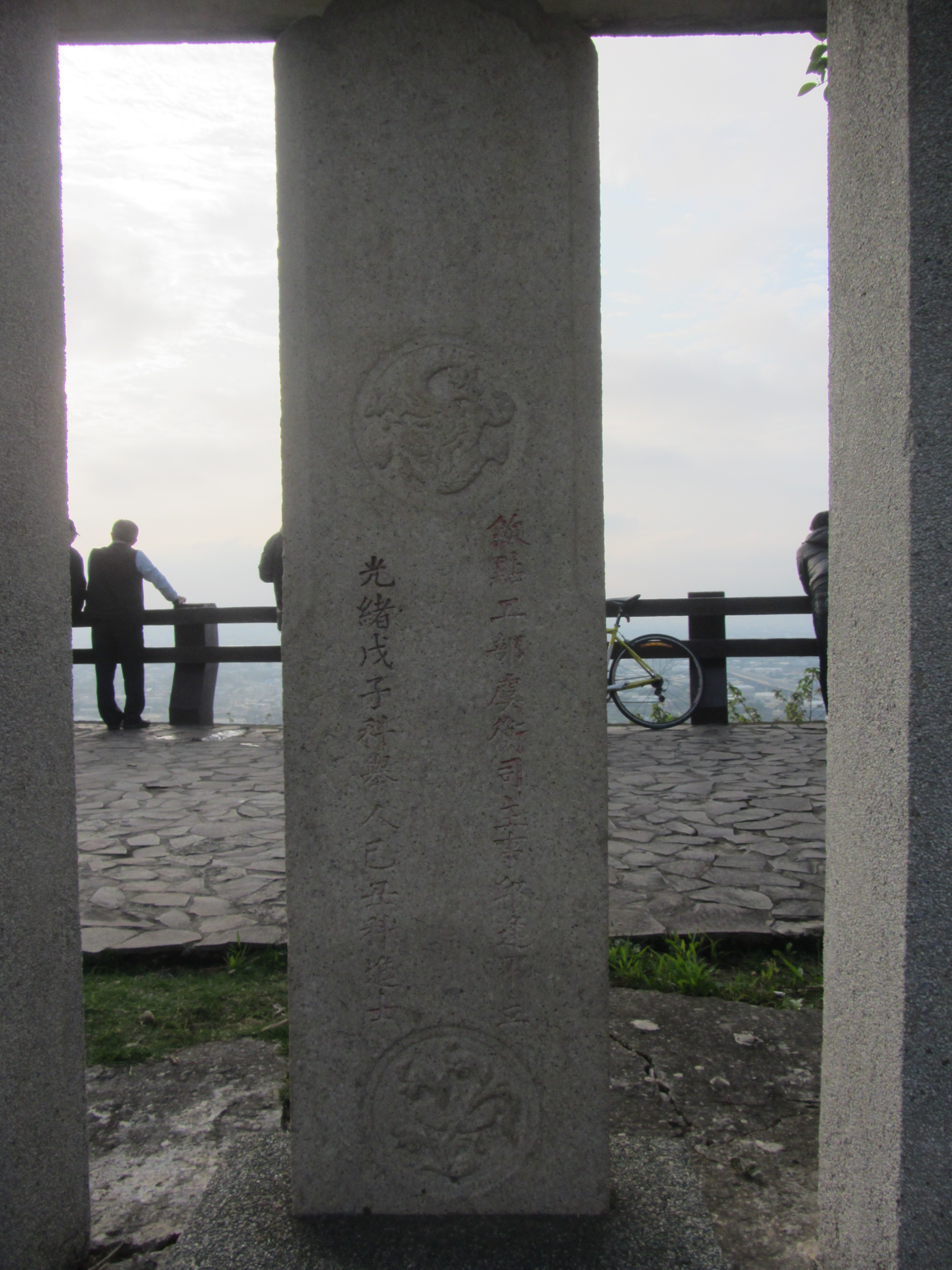 位於台中市豐原區丘逢甲紀念公園內的「丘逢甲進士碑旗桿座」